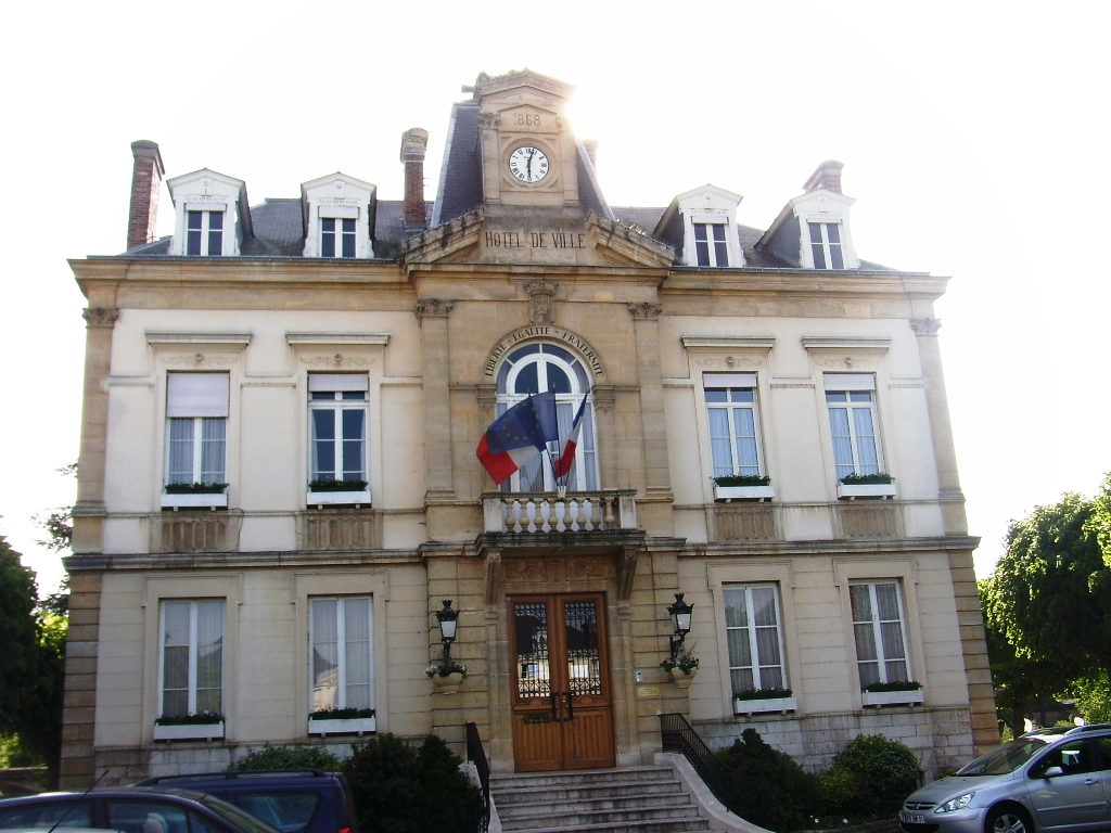 Hôtel de Ville d'Arpajon (91)